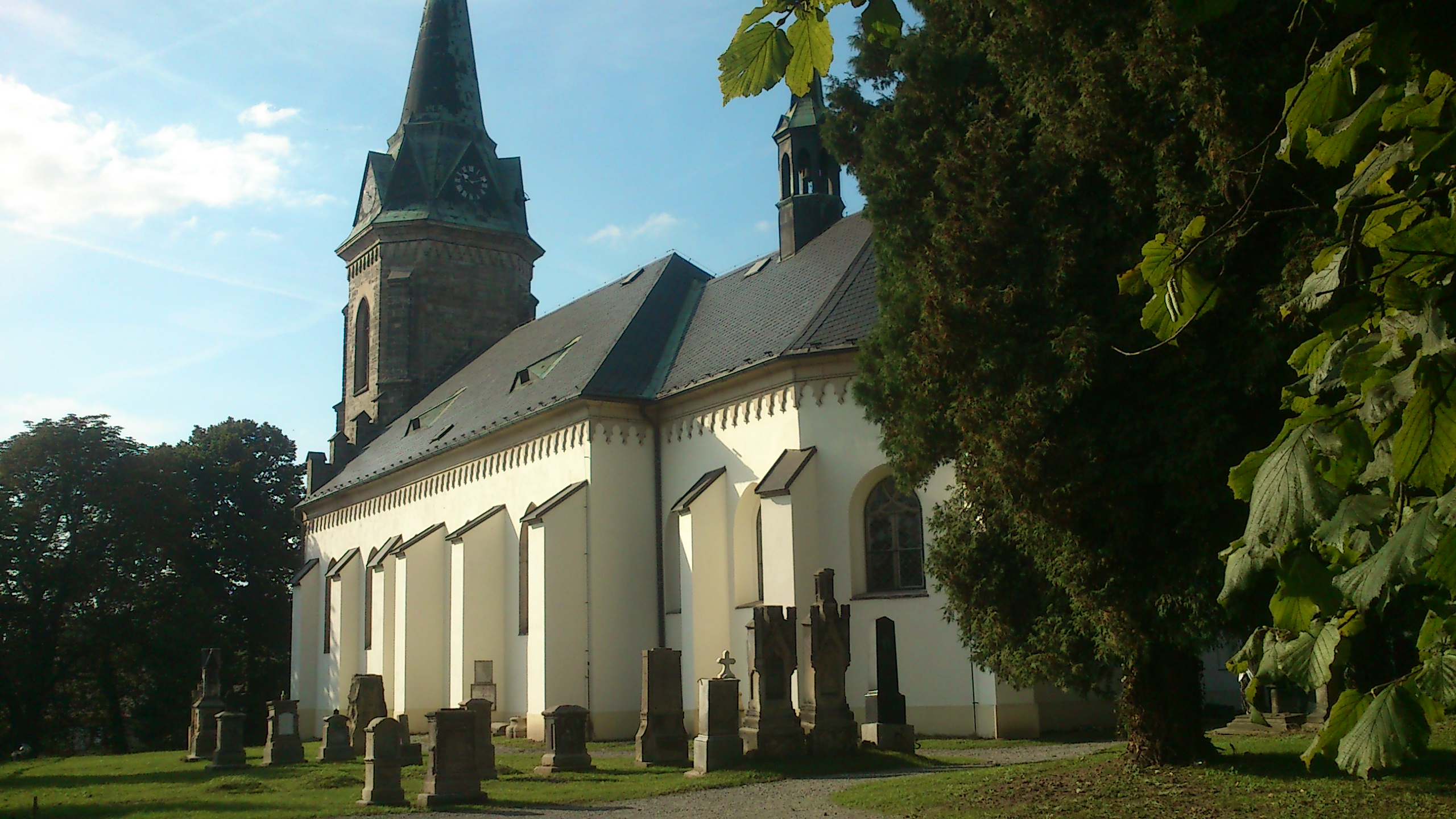 Kostel sv. Jakuba Většího (Přepeře)